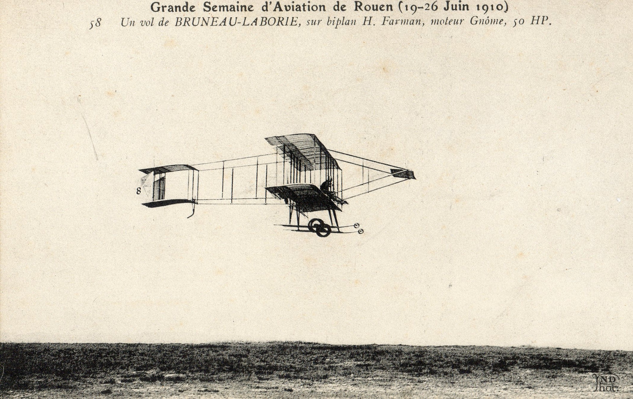 Un vol de Bruneau-Laborie, sur biplan H. Farman, moteur Gnôme, 50 HP lors de la Grande Semaine d'aviation de Rouen (19-26 Juin 1910)